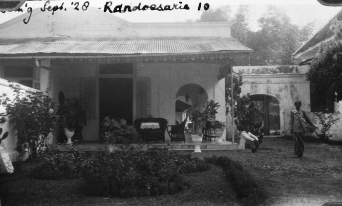 Foto. Het huis van Chr. Bonnet , Randoesari 10, Semarang